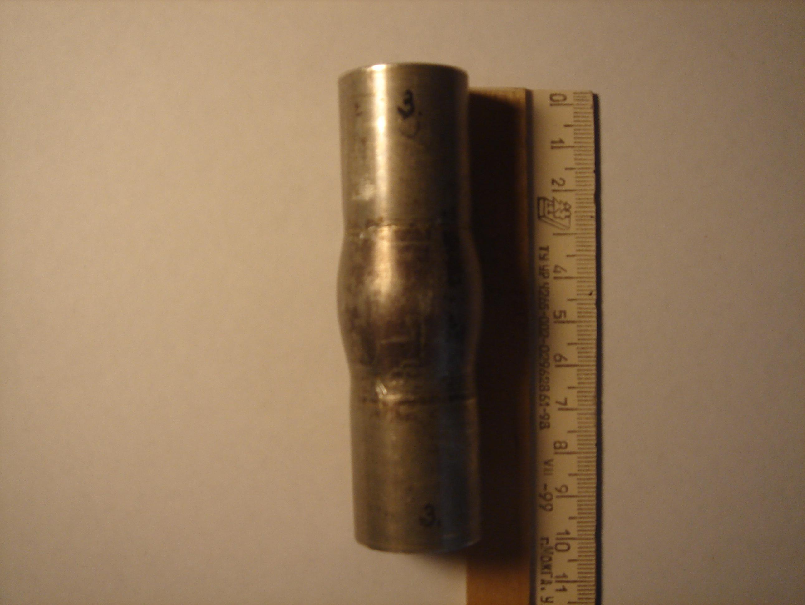 Разрыв заготовки при использовании чистойводы